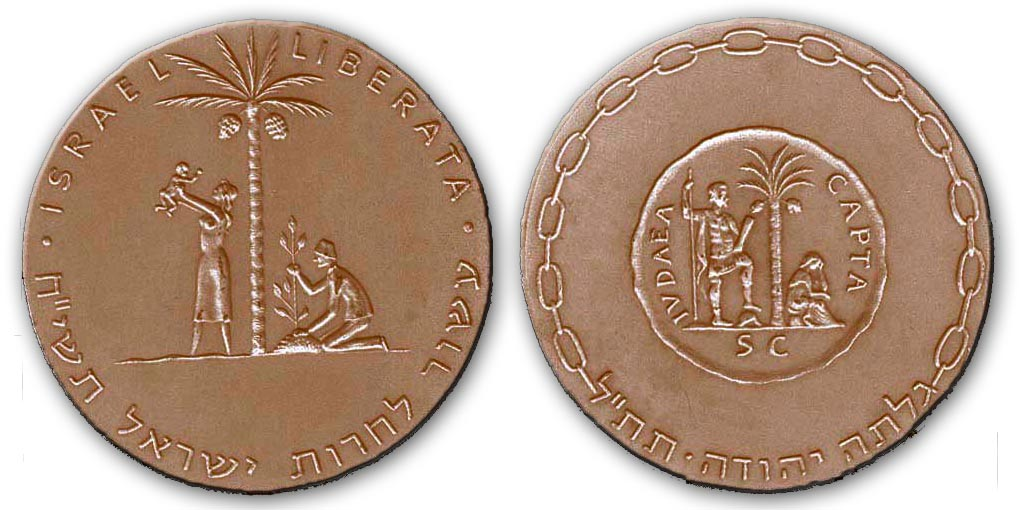 מדליית שחרור דור ב נחושת